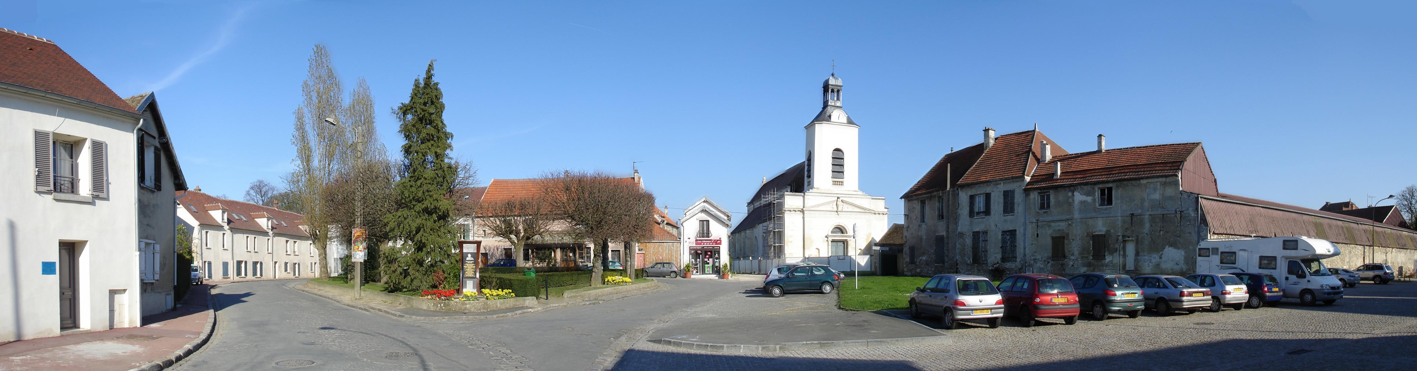 Vue panoramique de la place de l'église à Tremblay-en-France, Vieux-Pays (Seine-Saint-Denis, France).